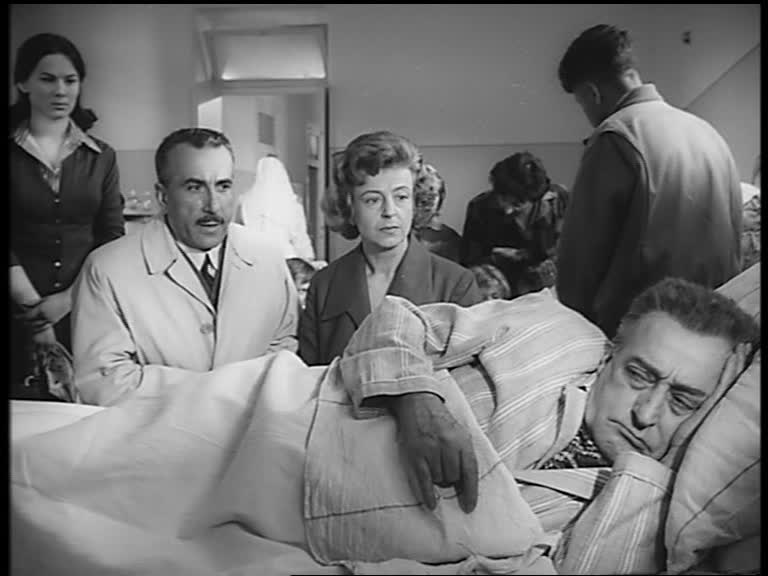 Gruppo di famiglia in ospedale: screenshot dal film Arrangiatevi! (1959) di Mauro Bolognini